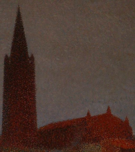 Clocher de la Dalbade par Henri Martin (détail), hôtel de ville de Toulouse, France